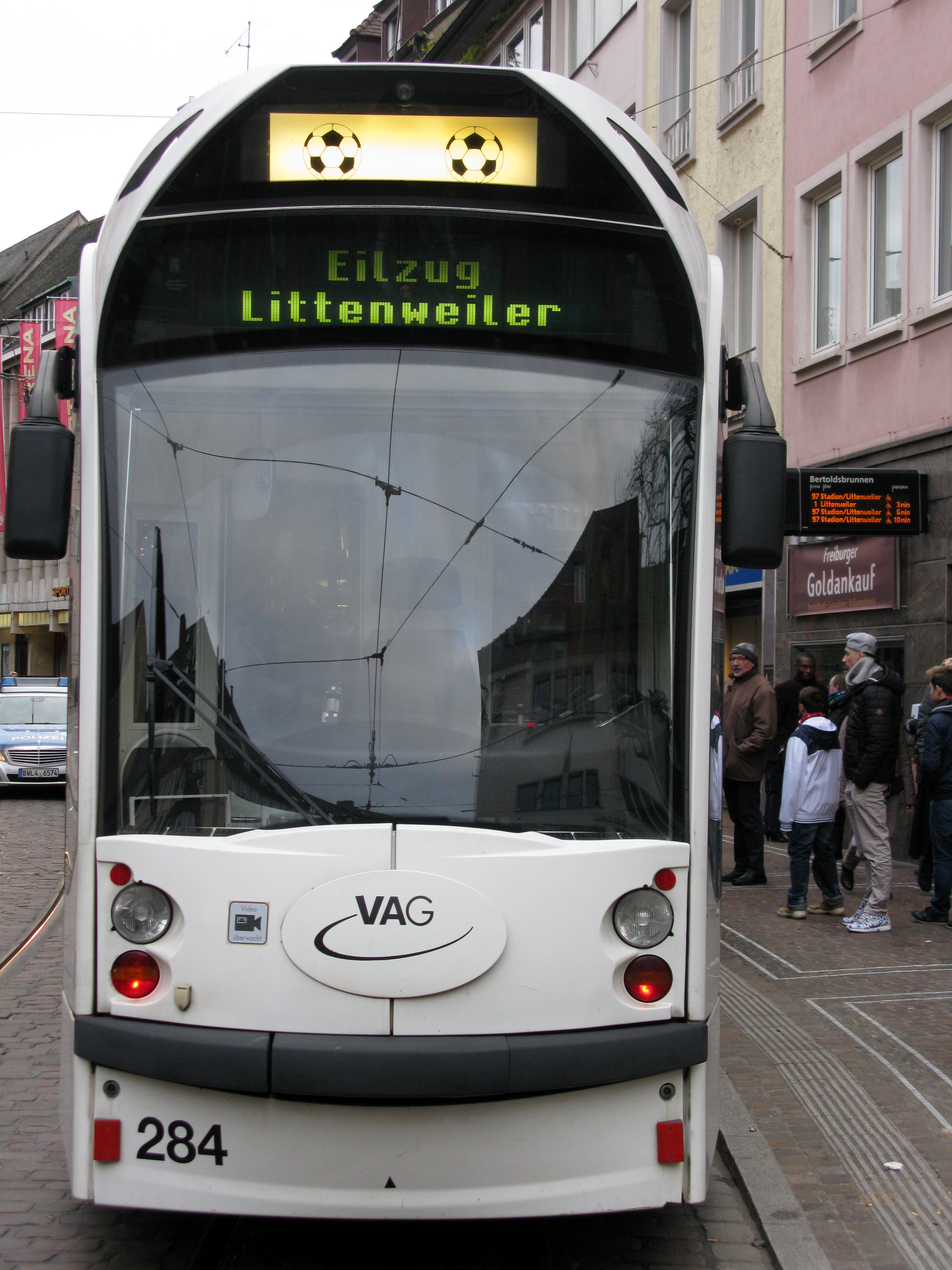 Eilzug der VAG zum Heimspiel des Sportclub Freiburg. Solche Bahnen verkehren auf dem Hinweg zwischen Bertoldsbrunnen und Römerhof ohne Halt. Nach Spielschluss fahren die ersten fünf Bahnen ohne Halt bis Oberlinden.